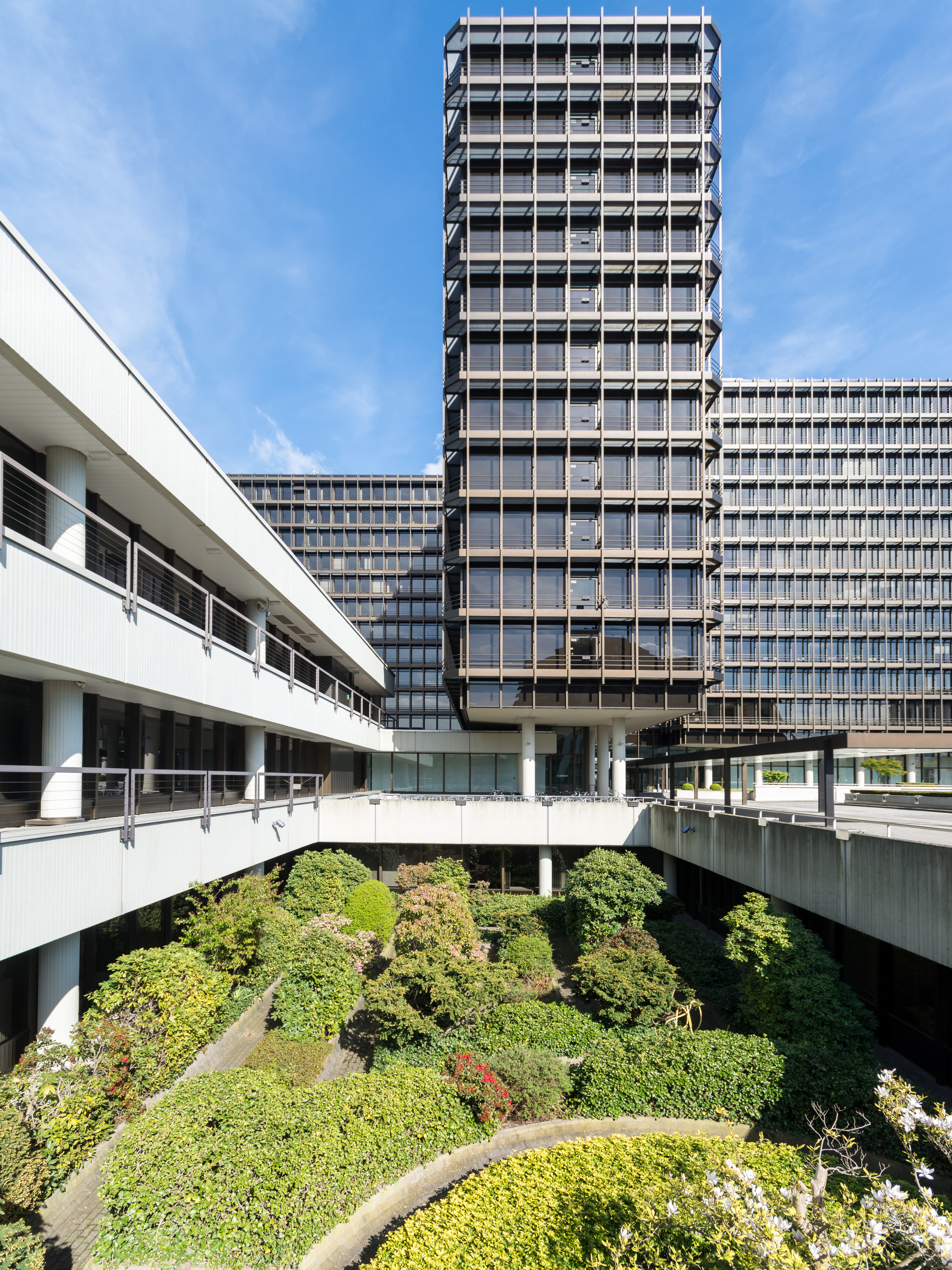 Bürohaus Überseering 35 in Hamburg-Winterhude. This is a photograph of an architectural monument.